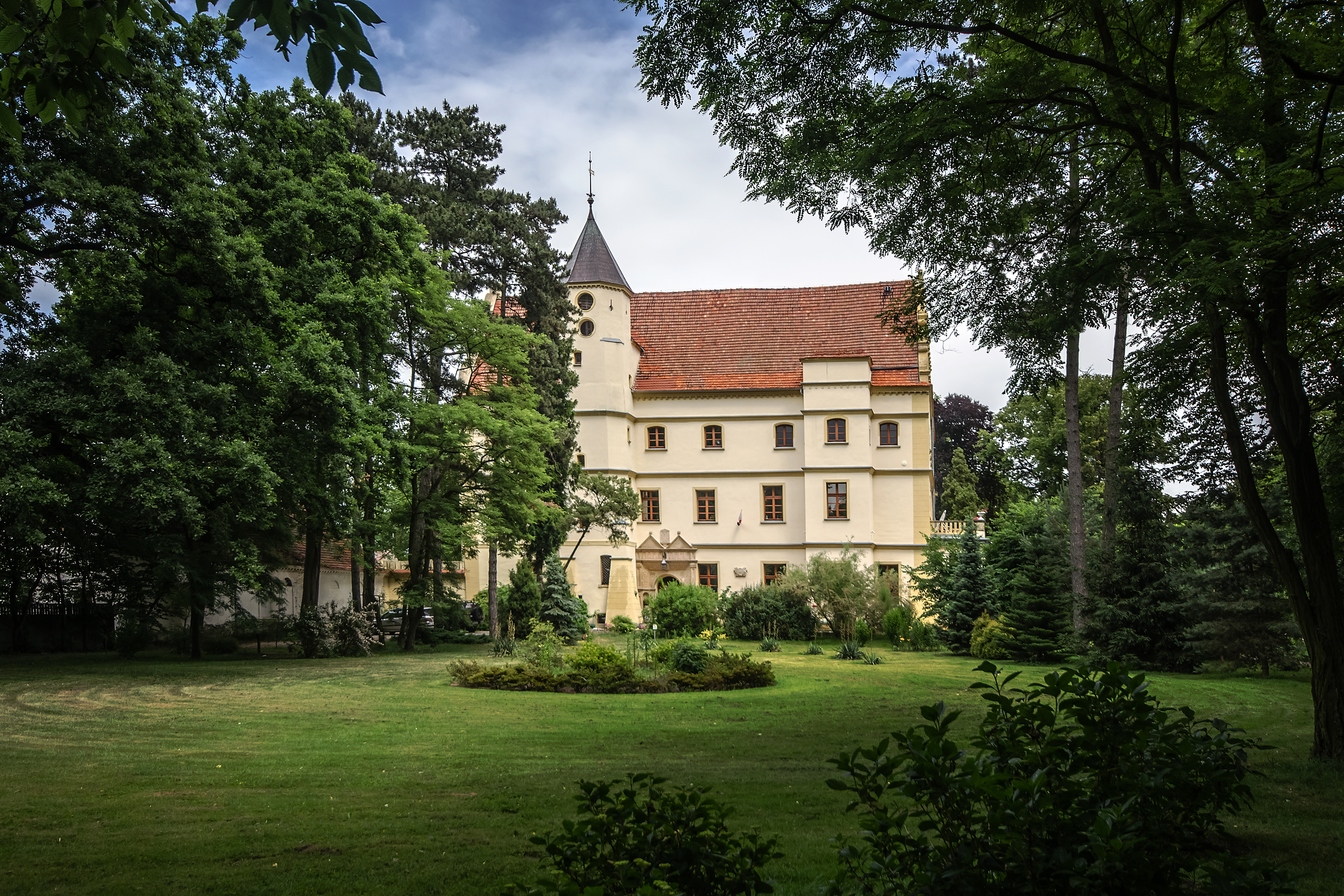 Czerna, pałac (dec. zamek), XVI, XIX